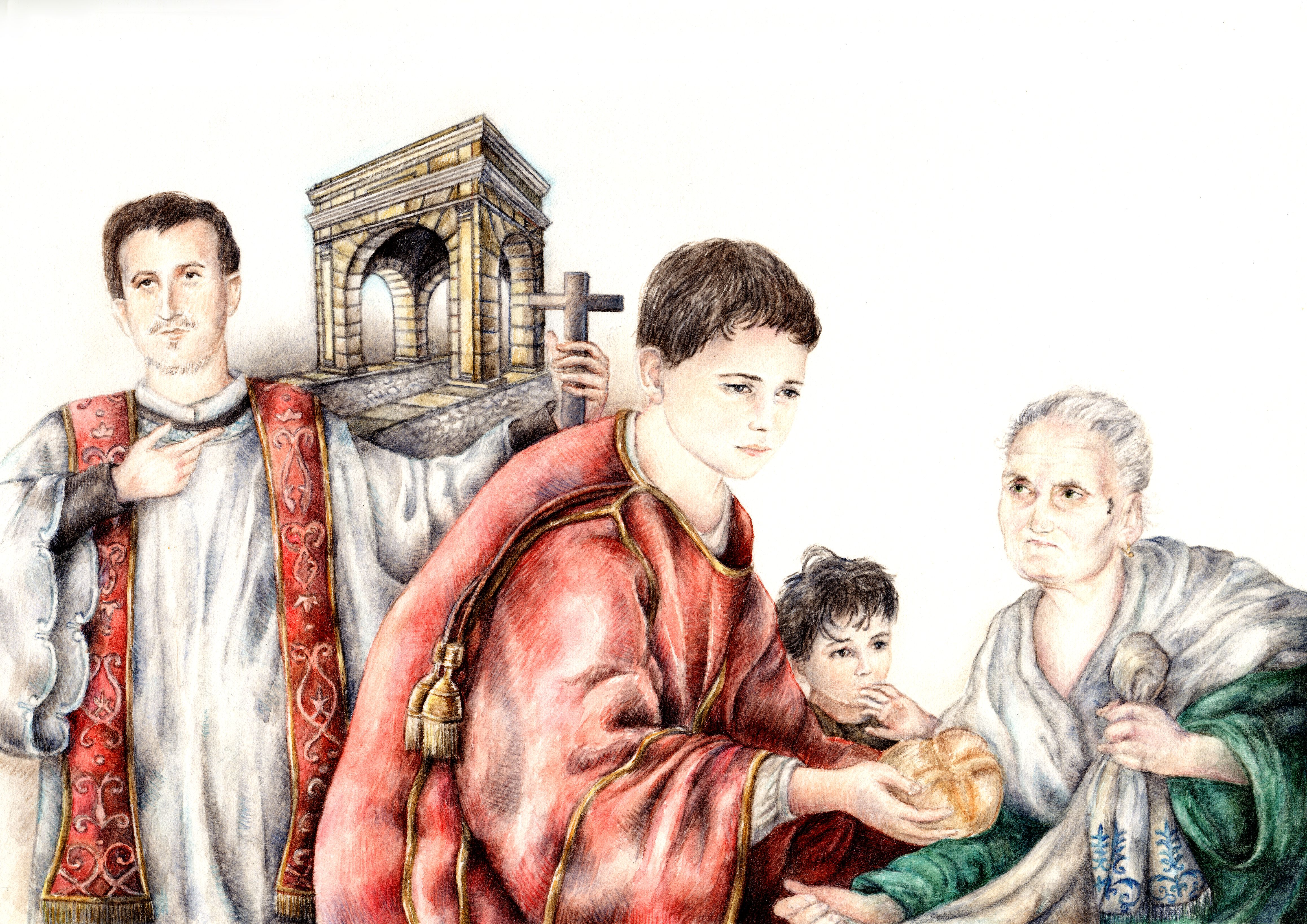 Il diacono Cesario si dedica alla parte più povera della popolazione di Terracina, insieme al compagno e maestro spirituale, il presbitero Giuliano. Sullo sfondo vi è Arco Quadrifronte sulla Via Appia nel Foro di Terracina, realizzato nel I secolo a.C. come ingresso monumentale verso est del Foro dell'antica città di Anxur.